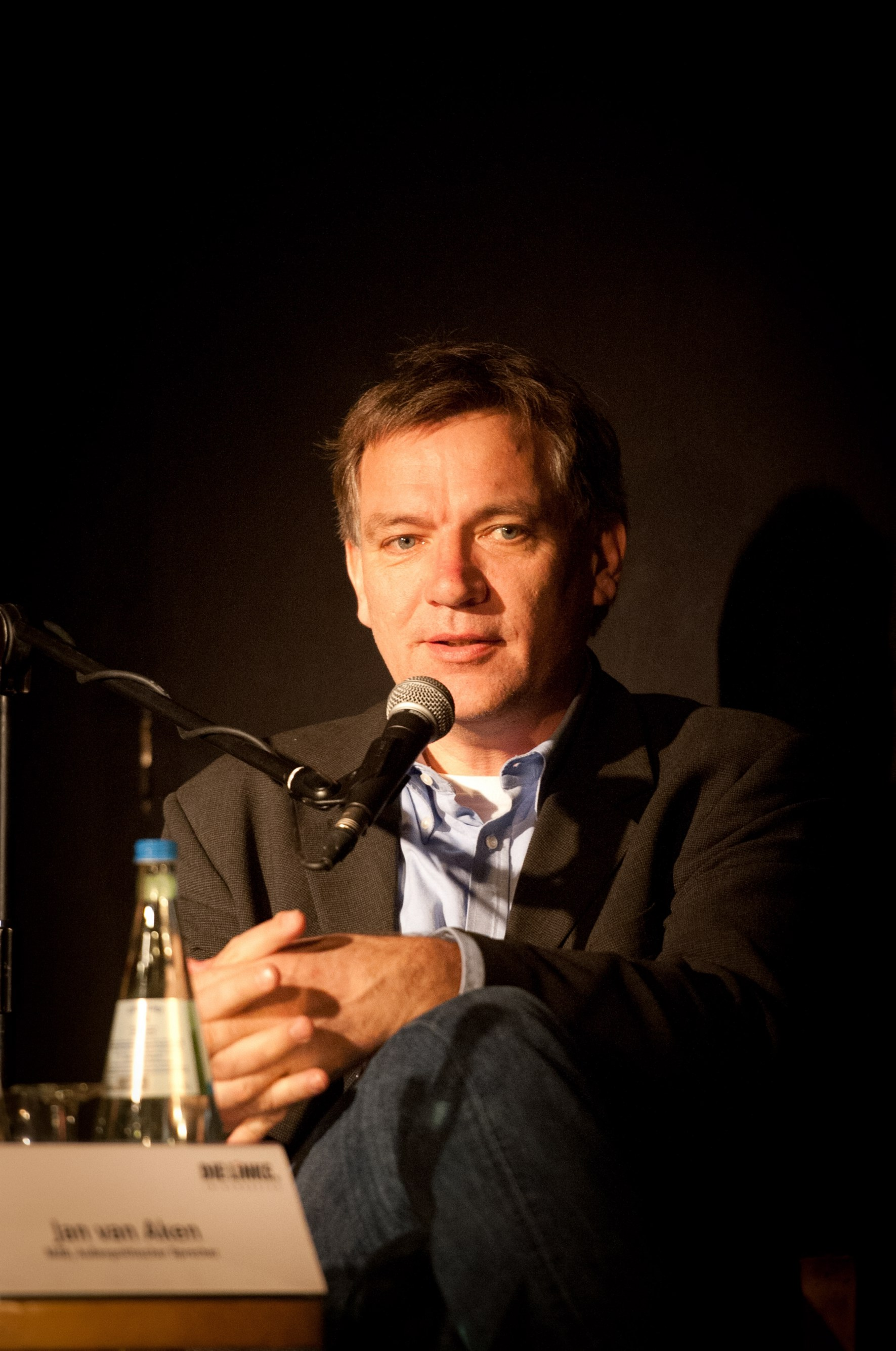 Irak-Konferenz der Fraktion DIE LINKE. im Bundestag Foto: Uwe Steinert Jan van Aken